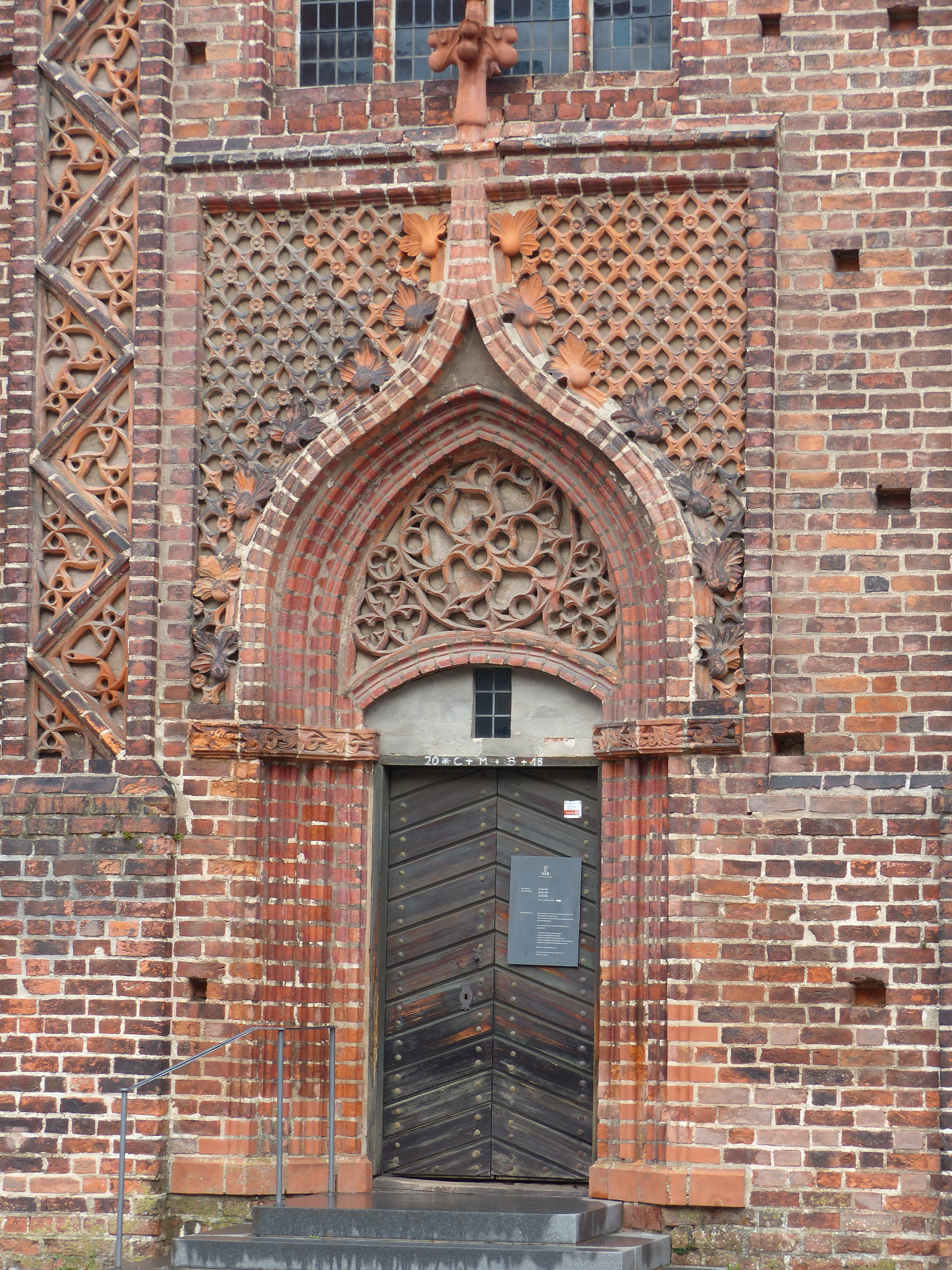 Burg Ziesar: Portal der Burgkapelle